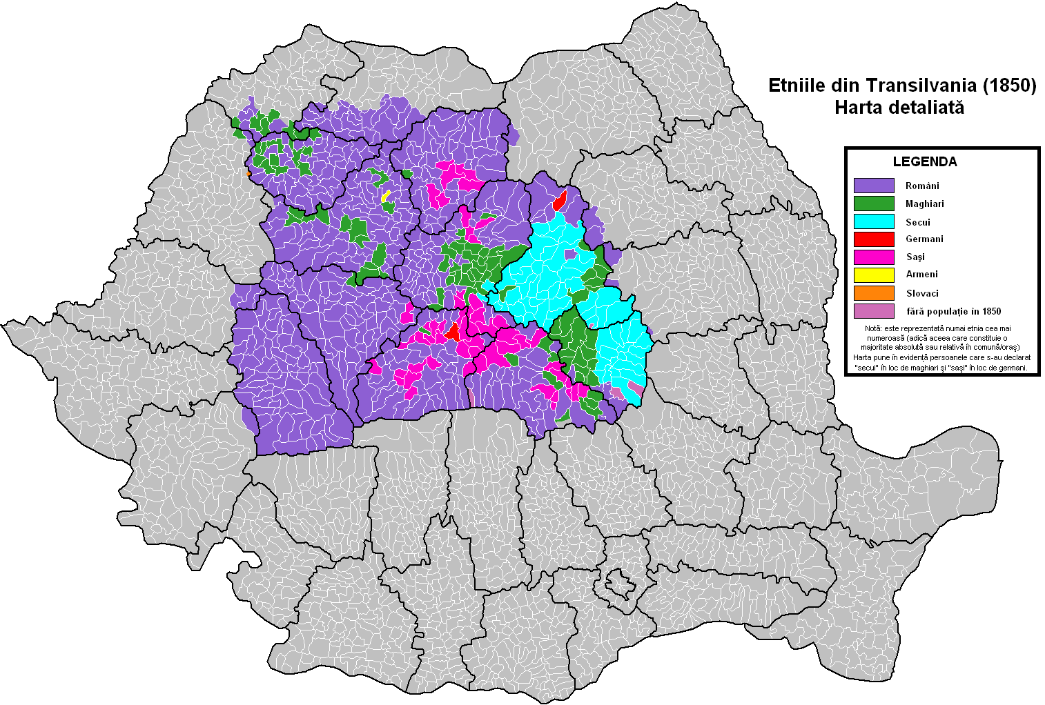 Harta etnică a Transilvaniei, pe baza datelor recensământului habsburgic din anul 1850. Harta reprezintă limitele administrative actuale: judeţe, comune, oraşe. Sunt reprezentate separat persoanele care s-au declarat saşi şi secui. În multe cazuri, secuii au preferat să de declare maghiari. Astfel, secuii din fostele scaune Arieș, Mureș şi Miklósvár (Trei Scaune) s-au declarat de regulă "maghiari". Secuii din fostele scaune Ciuc, Chizd (Trei Scaune), Orbai (Trei Scaune) şi Tileagd (Odorhei) s-au de regulă "secui". Saşii din Biertan s-au declarat "germani". În Braşov, unde la vremea aceea germanii erau majoritari, o parte a saşilor s-a declarat "germani", astfel încât numărul persoanelor declarate "saşi" era mai mic decât cel al românilor, rezultând o majoritate relativă românească.